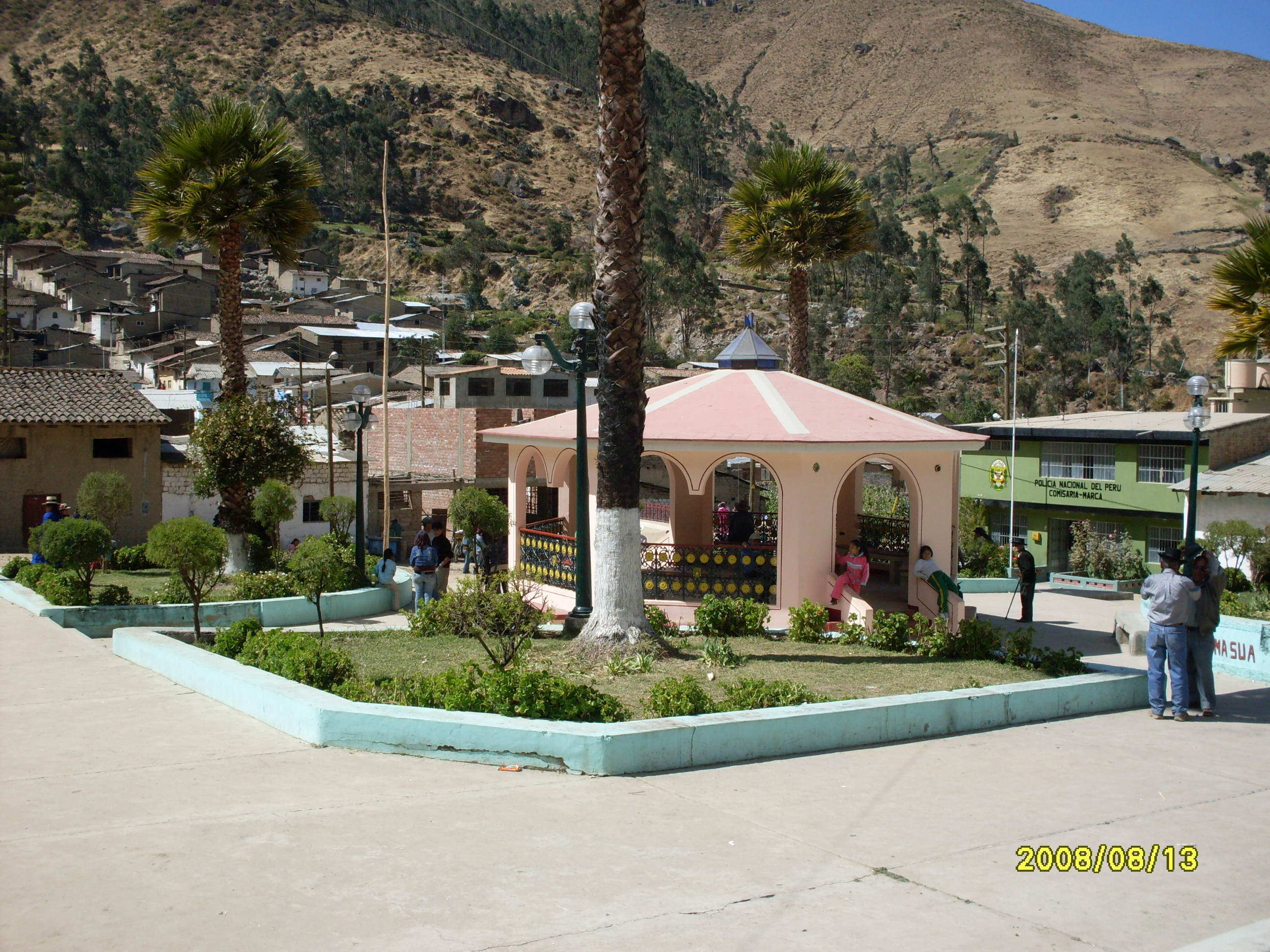 Plazuela de Marca